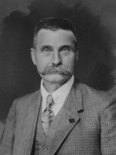 Wilhelm Schiegl (1866-1936), rakouský sociálně demokratický politik